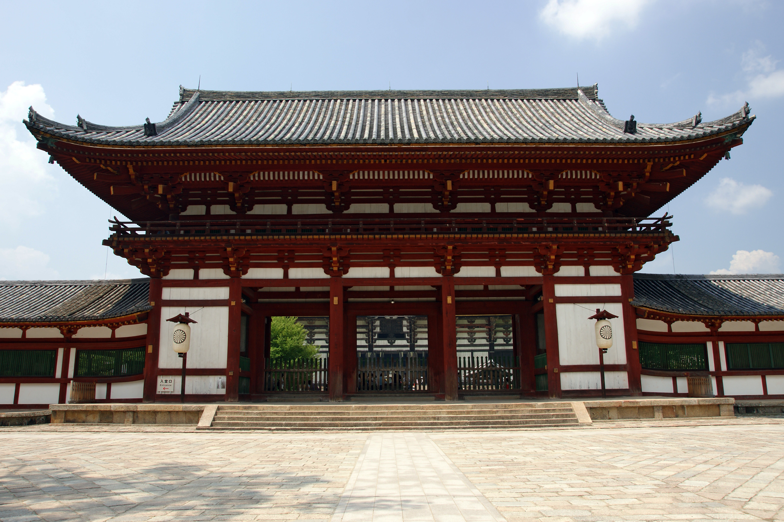 Tōdai-ji in Nara, Nara, Japan